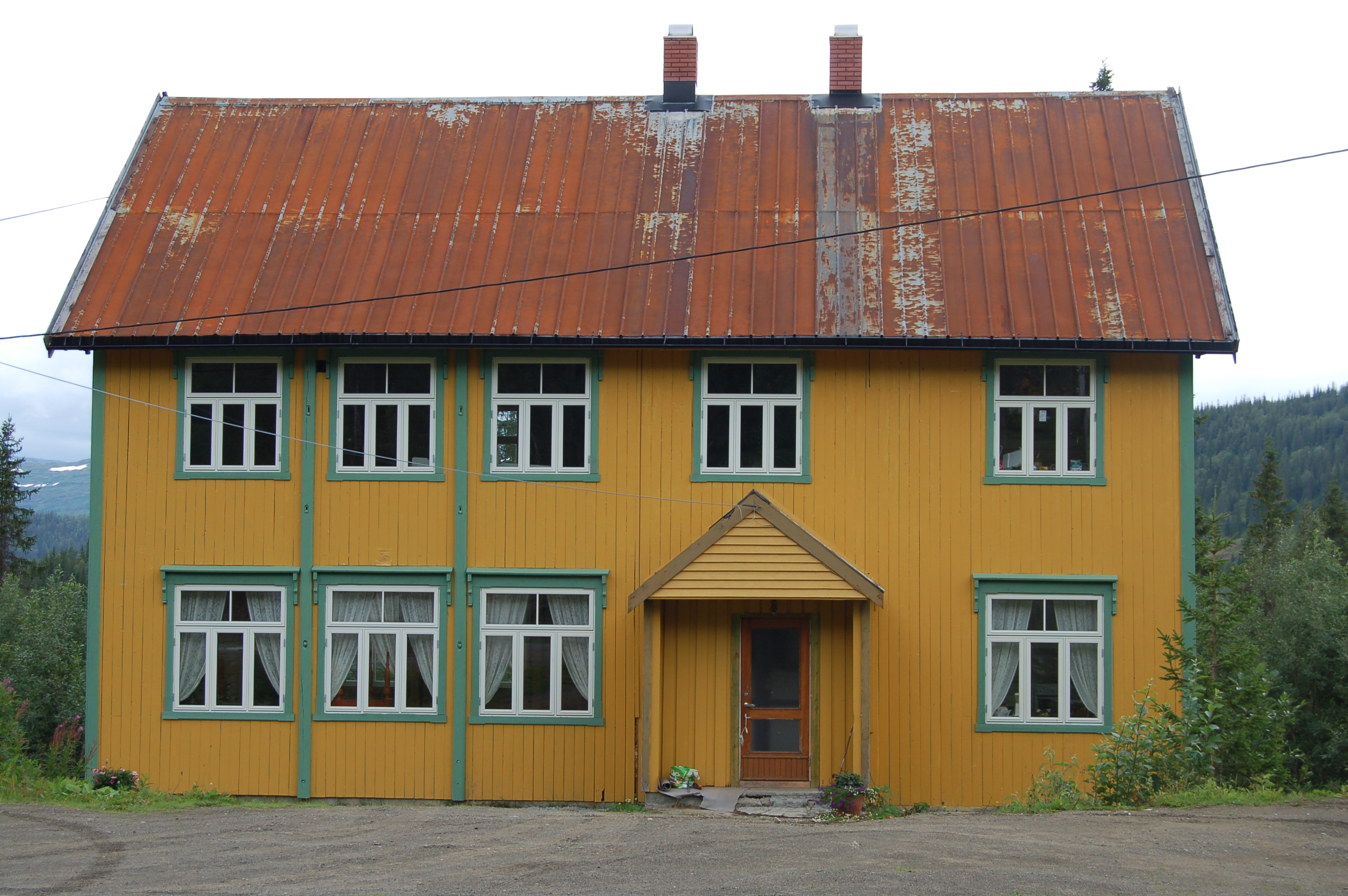 Den gamle internatskolen i Bleikvasslia, Hemnes, Norldand